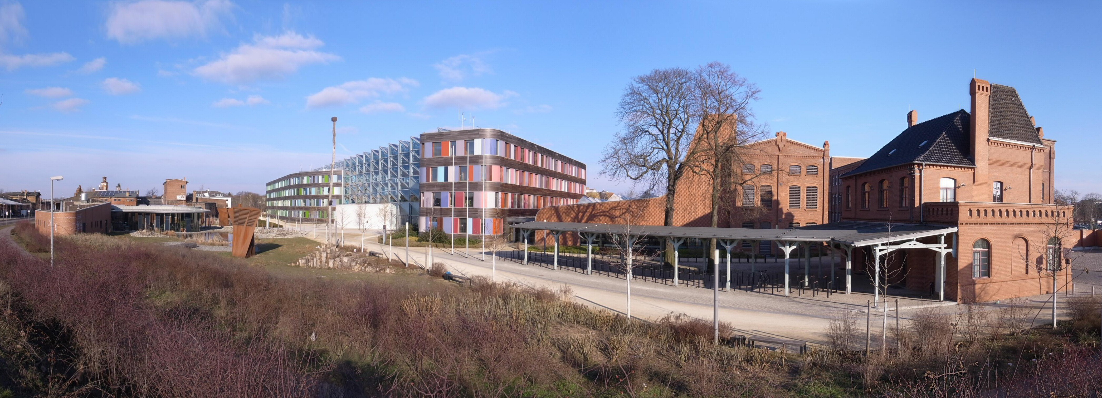 Umweltbundesamt Dessau mit den dazu gehörenden Gebäuden: vorne links die Kantine in der Mitte links das Hauptgebäude, Mitte rechts das Gebäude 109 des ehemaligen Gasviertel heute Bibliothek, rechts der Wörlitzer Bahnhof